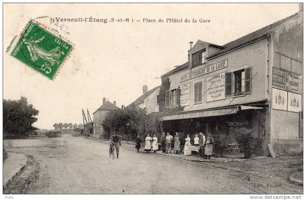 Café de la gare "grande ligne" de Verneuil-l'étang avec au fond, les bâtiments de la station de tramway de Verneuil.